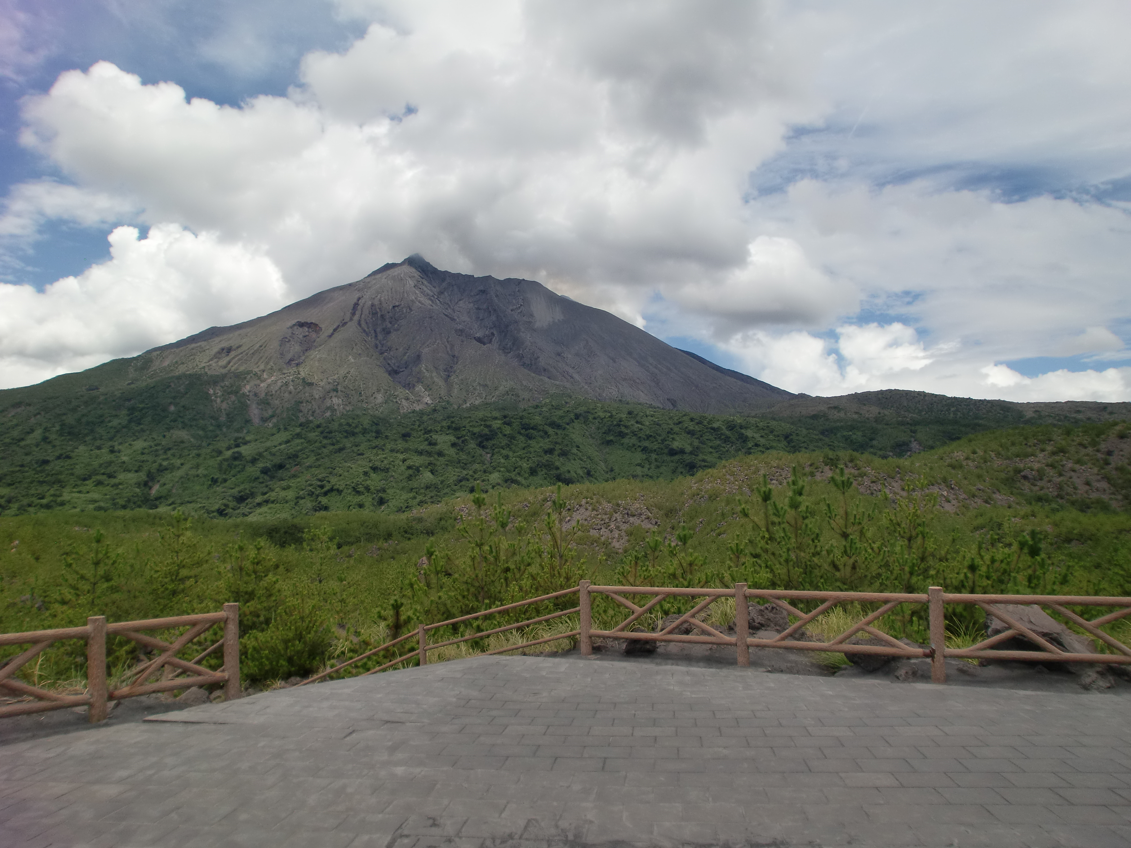 有村溶岩展望所から望む桜島（御岳）。